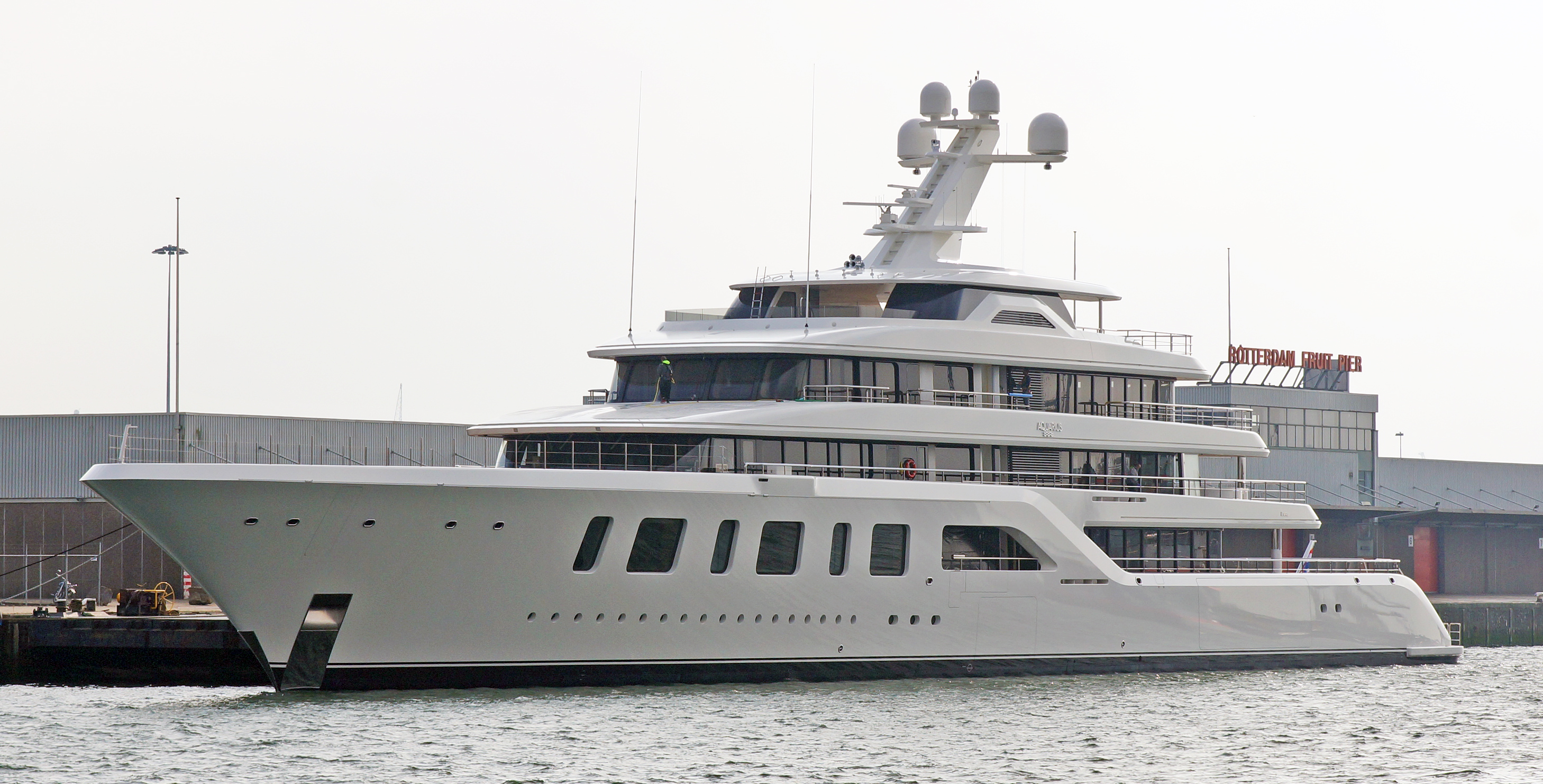 Lekhaven Rotterdam 15-10-2016 . AQUARIUS 92 m lang gebouwd in 2016 bij Feadship in Aalsmeer voor de Amerikaanse miljardair Steve Wynn.